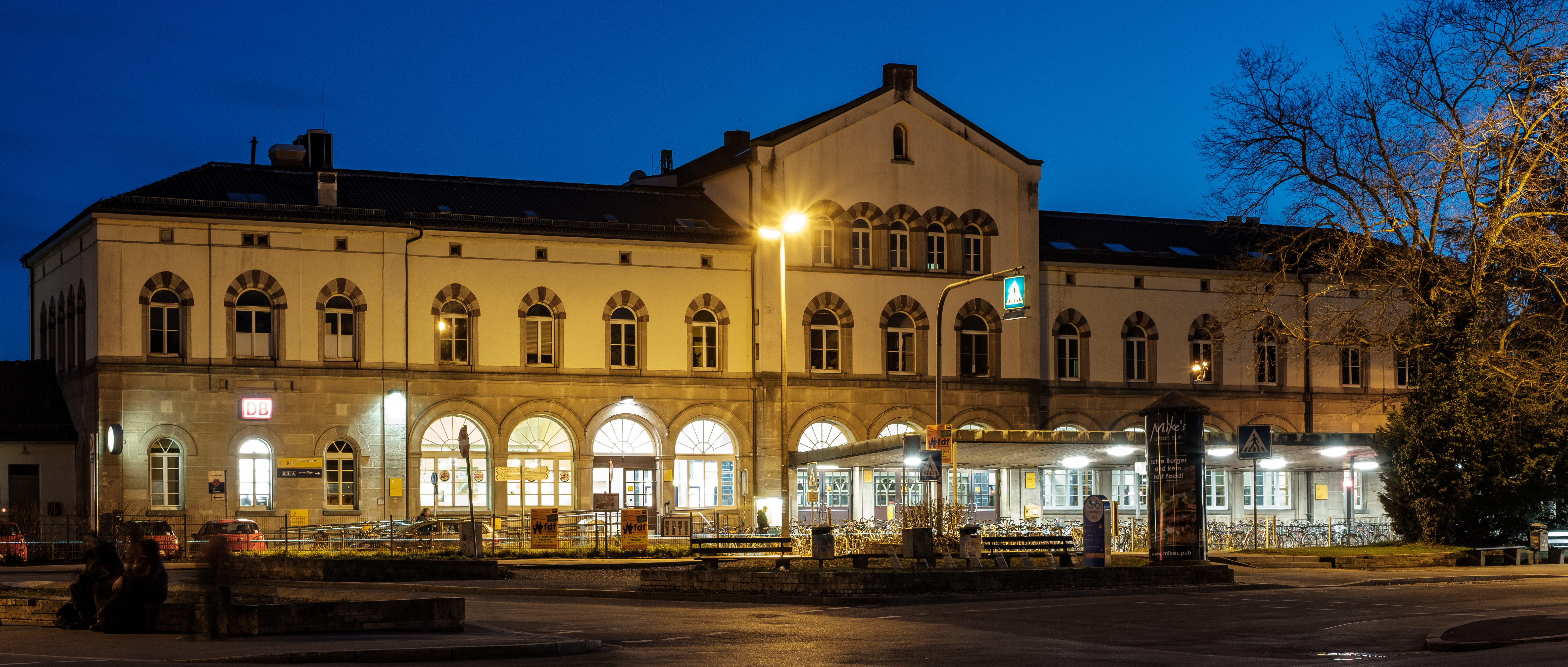 Tübingen Hauptbahnhof zur blauen Stunde